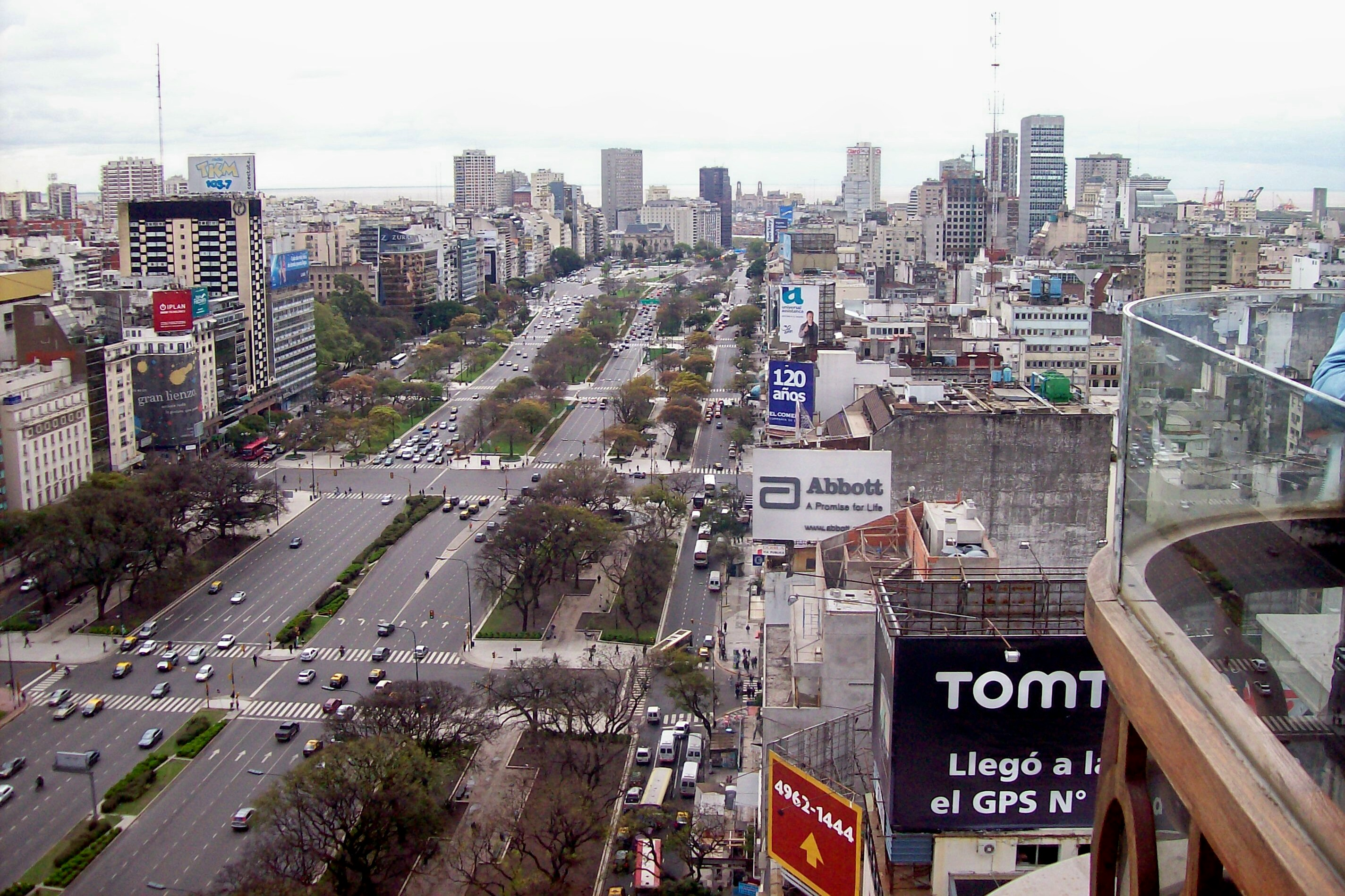 Avenida 9 de Julio, vista desde el Hotel Panamericano hacia el Norte, Buenos Aires, Argentina.